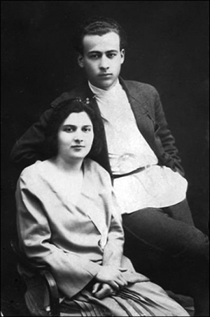 Леонід Первомайський із дружиною Євдокією. Красноград на Харківщині, 1927 рік